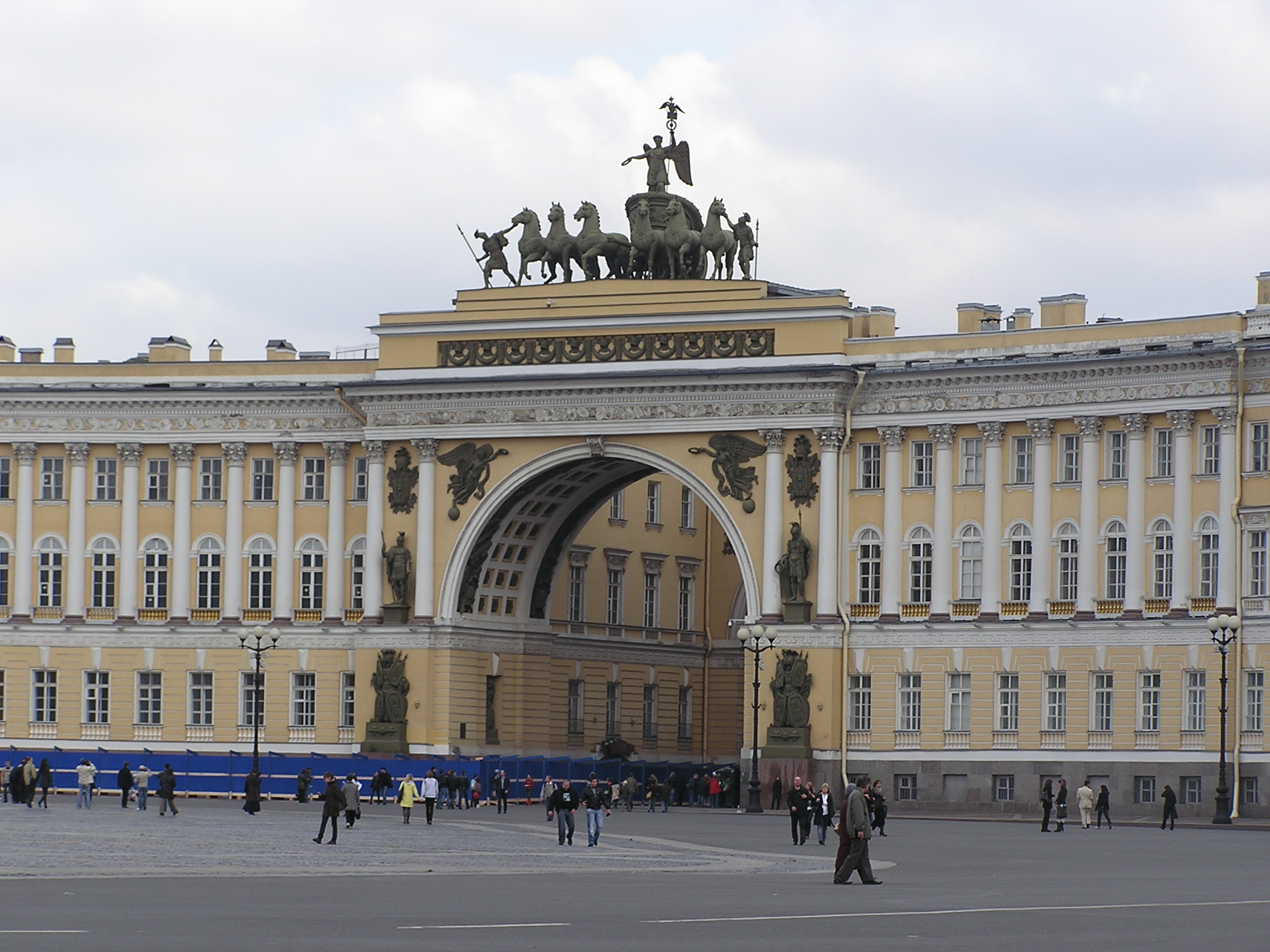 Санкт-Петербург. Арка Главного штаба